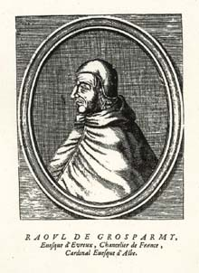 Raoul de Grosparmy (-1270), chancelier de Louis IX, évêque d'Évreux (1259-1263), cardinal et légat apostolique.